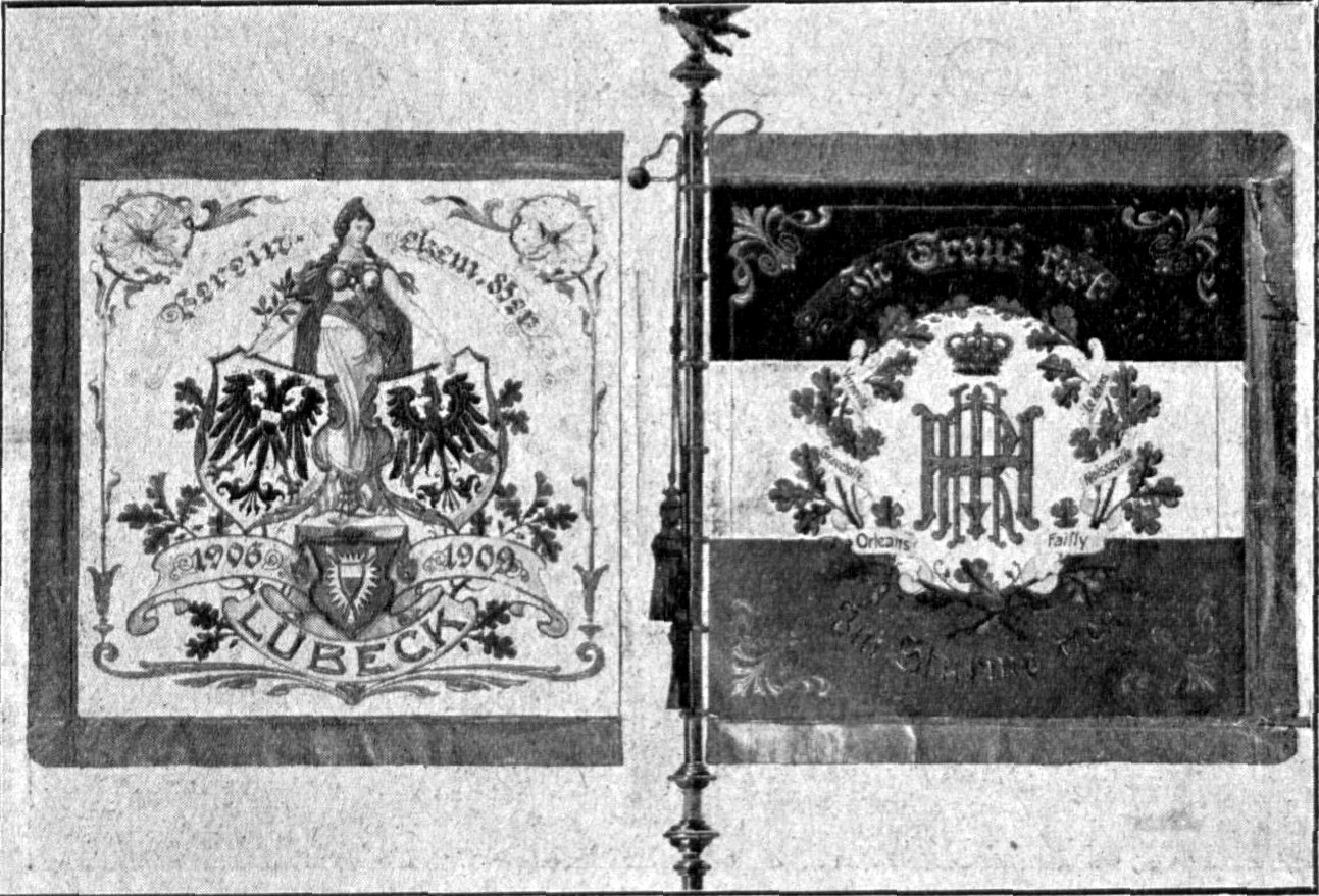 Fahne des Vereins ehem. 85er zu Lübeck